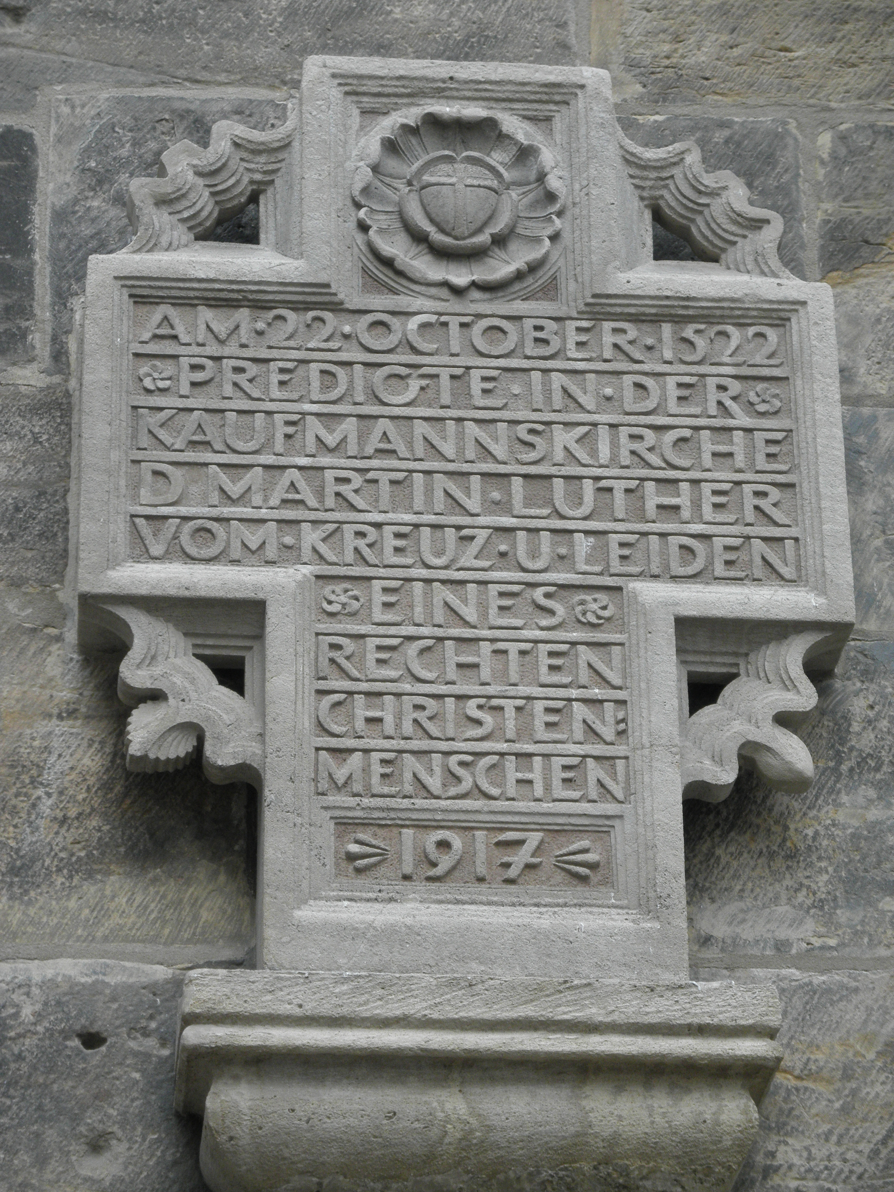 Kaufmannskirche